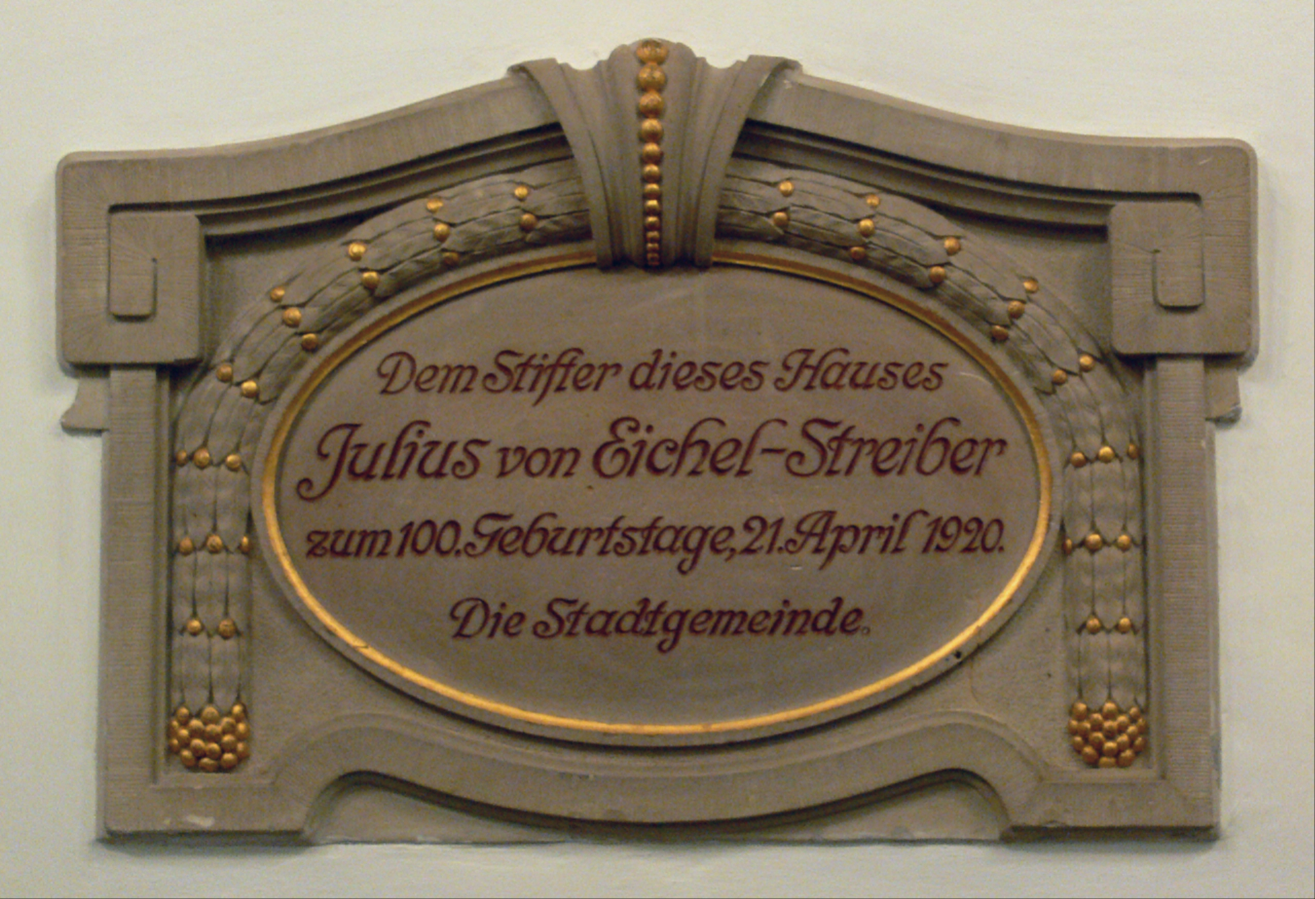 Landestheater Eisenach Gedenktafel für den Stifter Julius von Eichel-Streiber